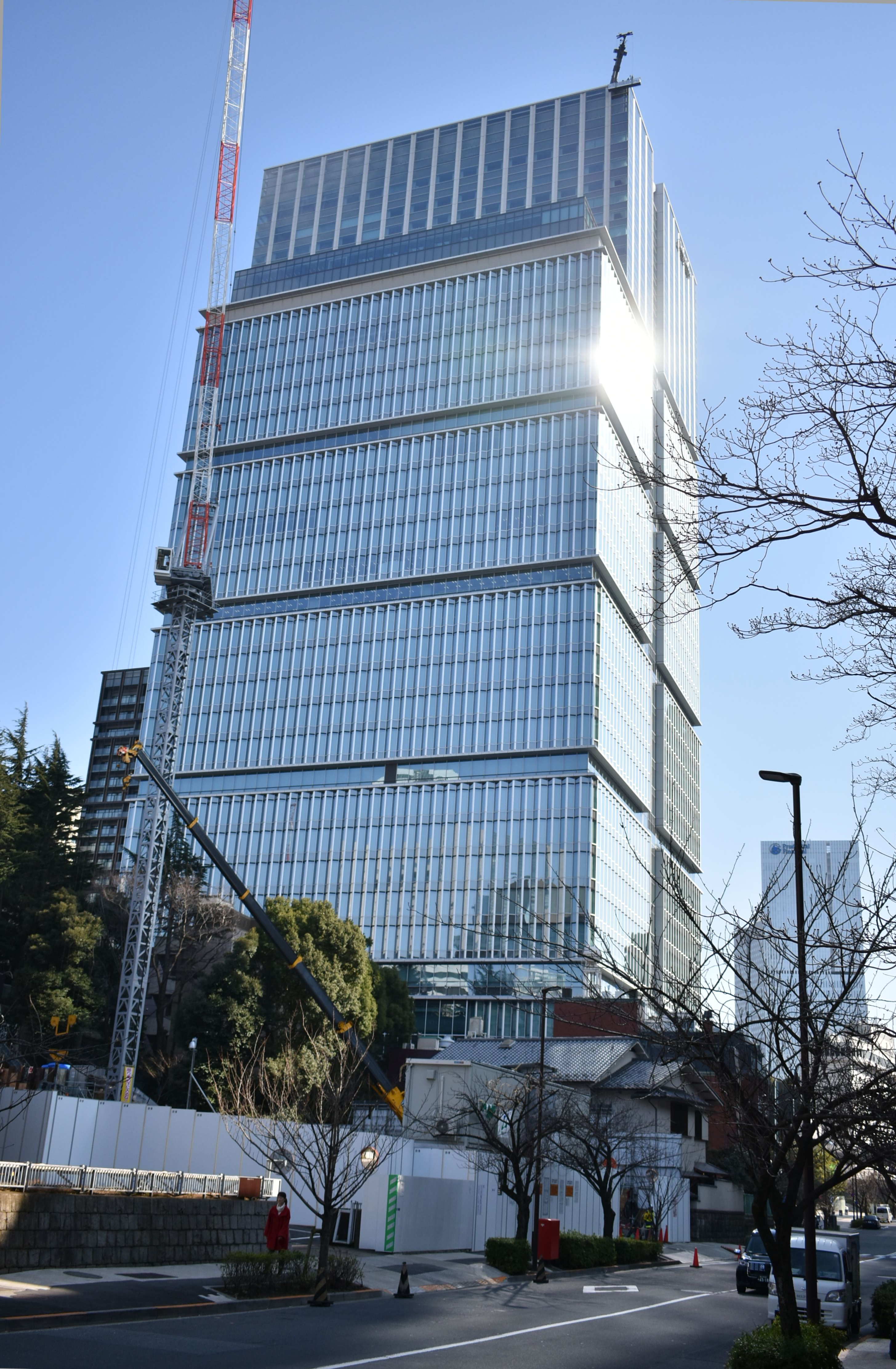 東京ガーデンテラス紀尾井町 !Nikon D3400